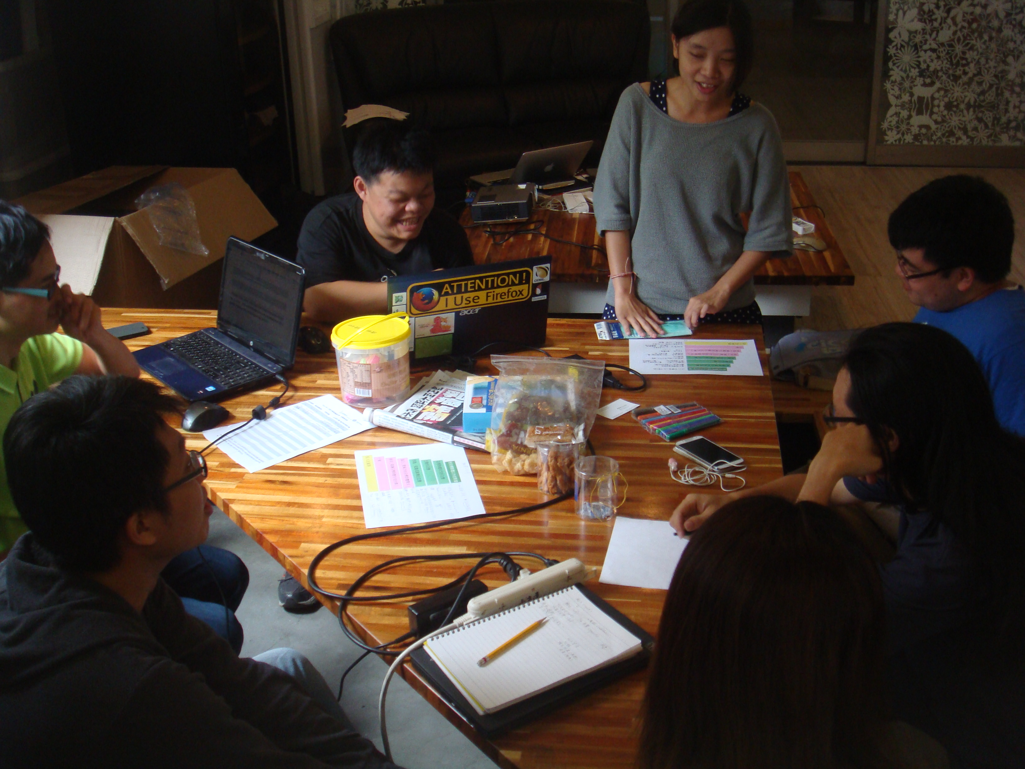 20150607維基社群工作坊